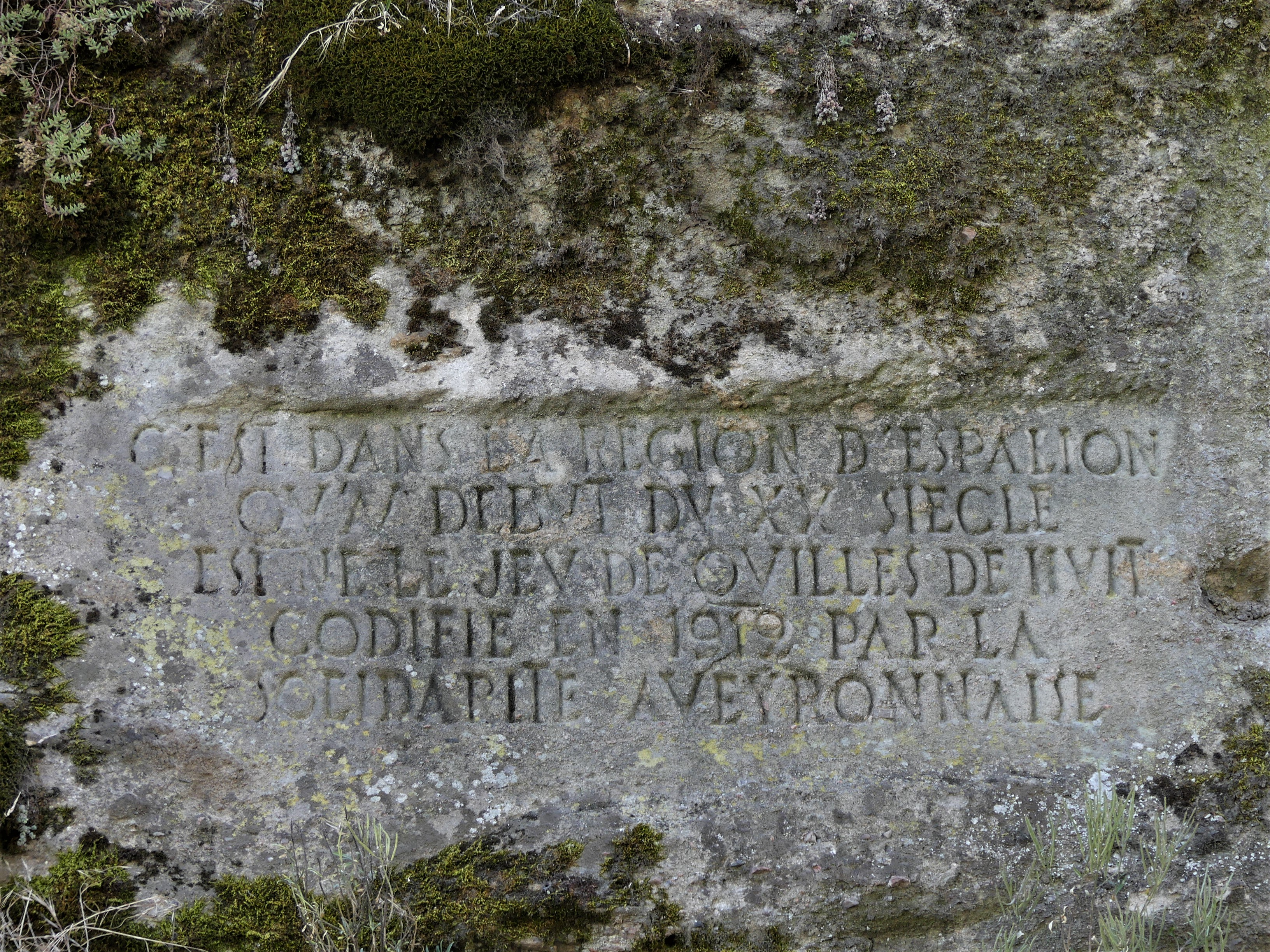 Inscription concernant les quilles de huit à Espalion, Aveyron, France.